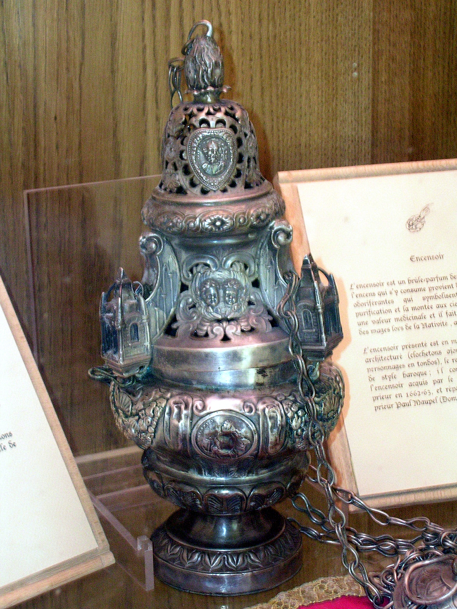 Abbaye de Saint-Sever, dans les Landes (France) : l'encensoir Photo prise par Jibi44 en juillet 2006